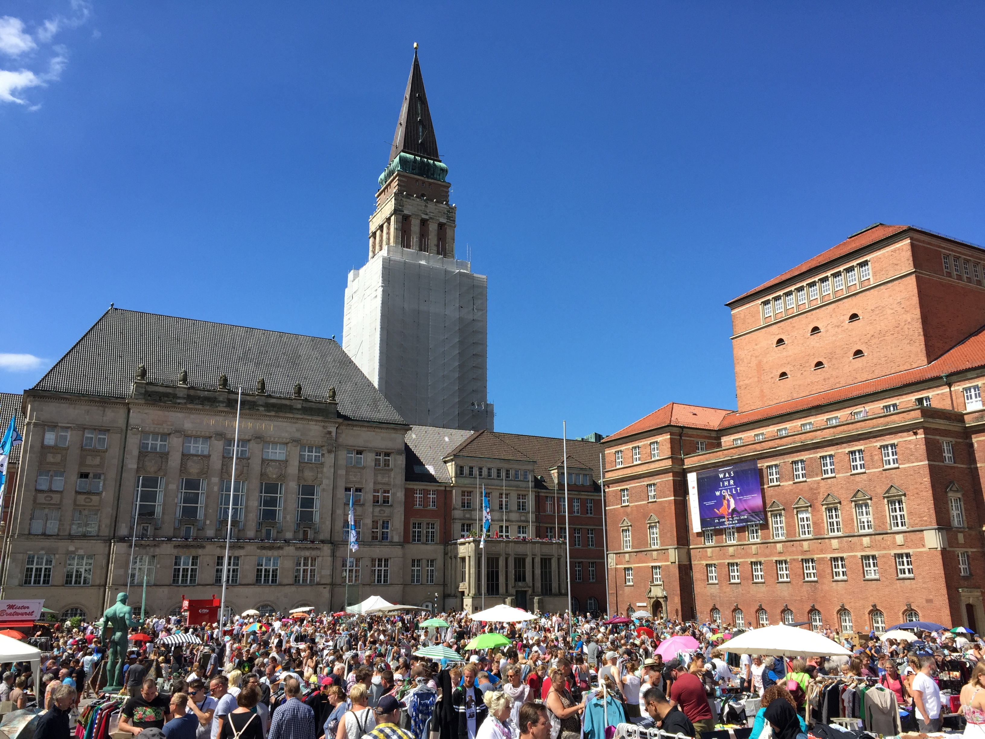 Flohmarkt Kiel Rathausplatz